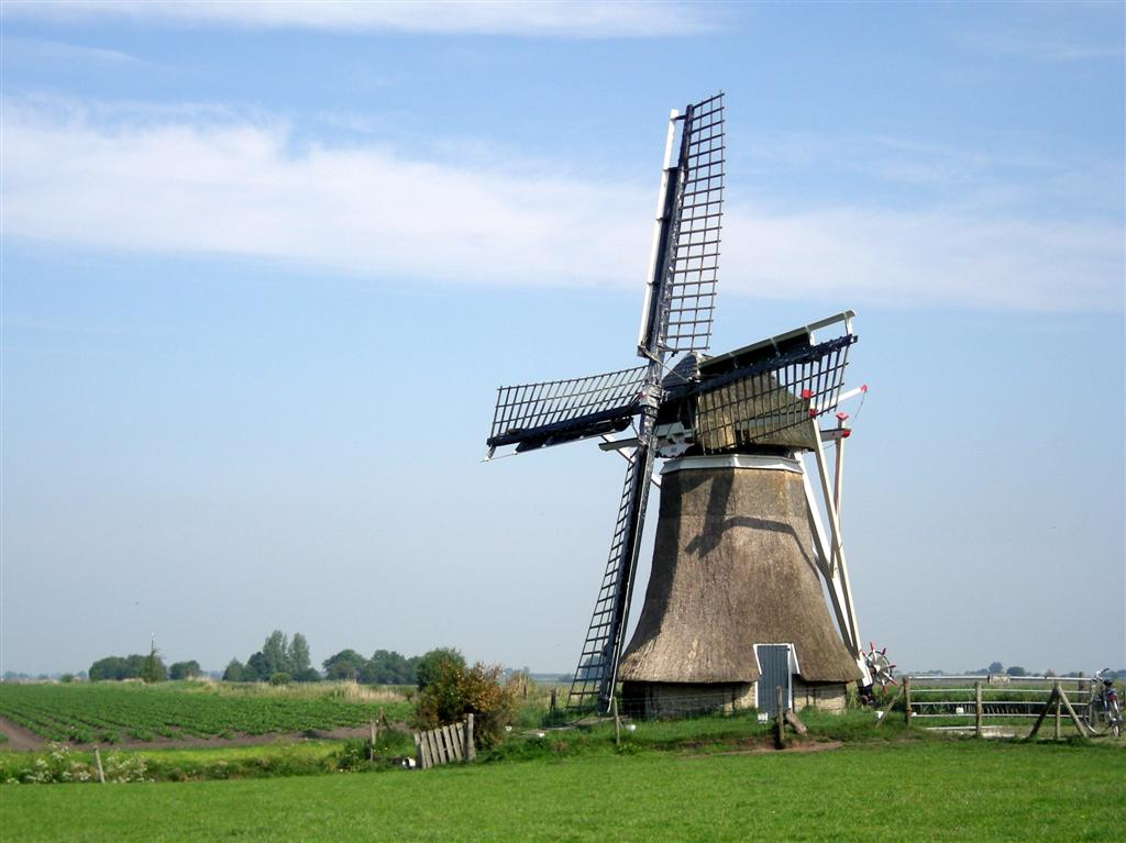 De Skarrenmolen bij Scharsterbrug langs de Skarster Rien